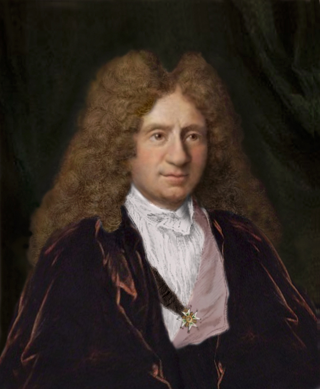 Delalande porte ici l'ordre de Saint-Michel, que Louis XV lui donna en 1722 bien que ses traits sont plus ou moins ceux de son portrait de Santerre datant d'environ 1705.